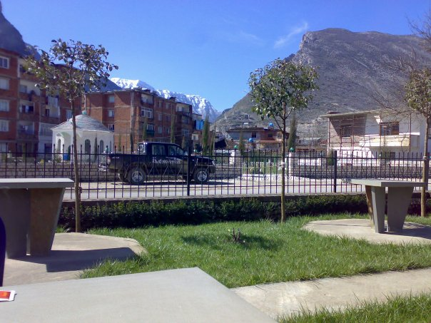 Teqeja në Këlcyrë